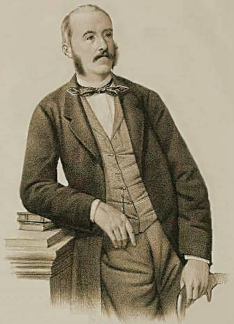 G. Riccio, Ritratto di Marco Minghetti, litografia.